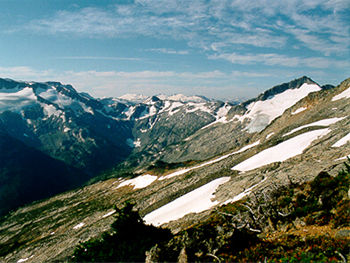 Alpine tundra